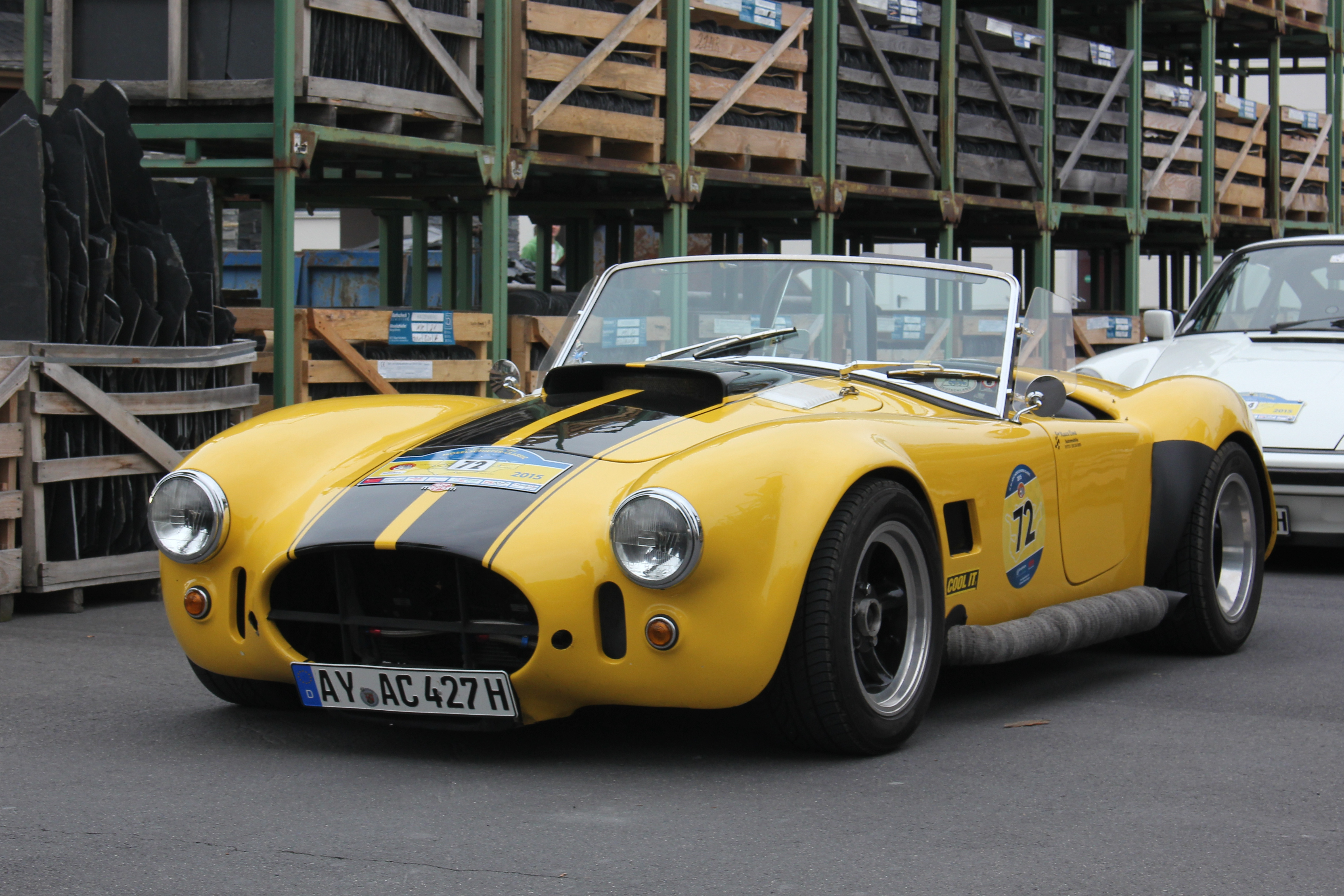 AC Cobra 427 Replica Magnum (Kennzeichen des Fahrzeugs verändert)